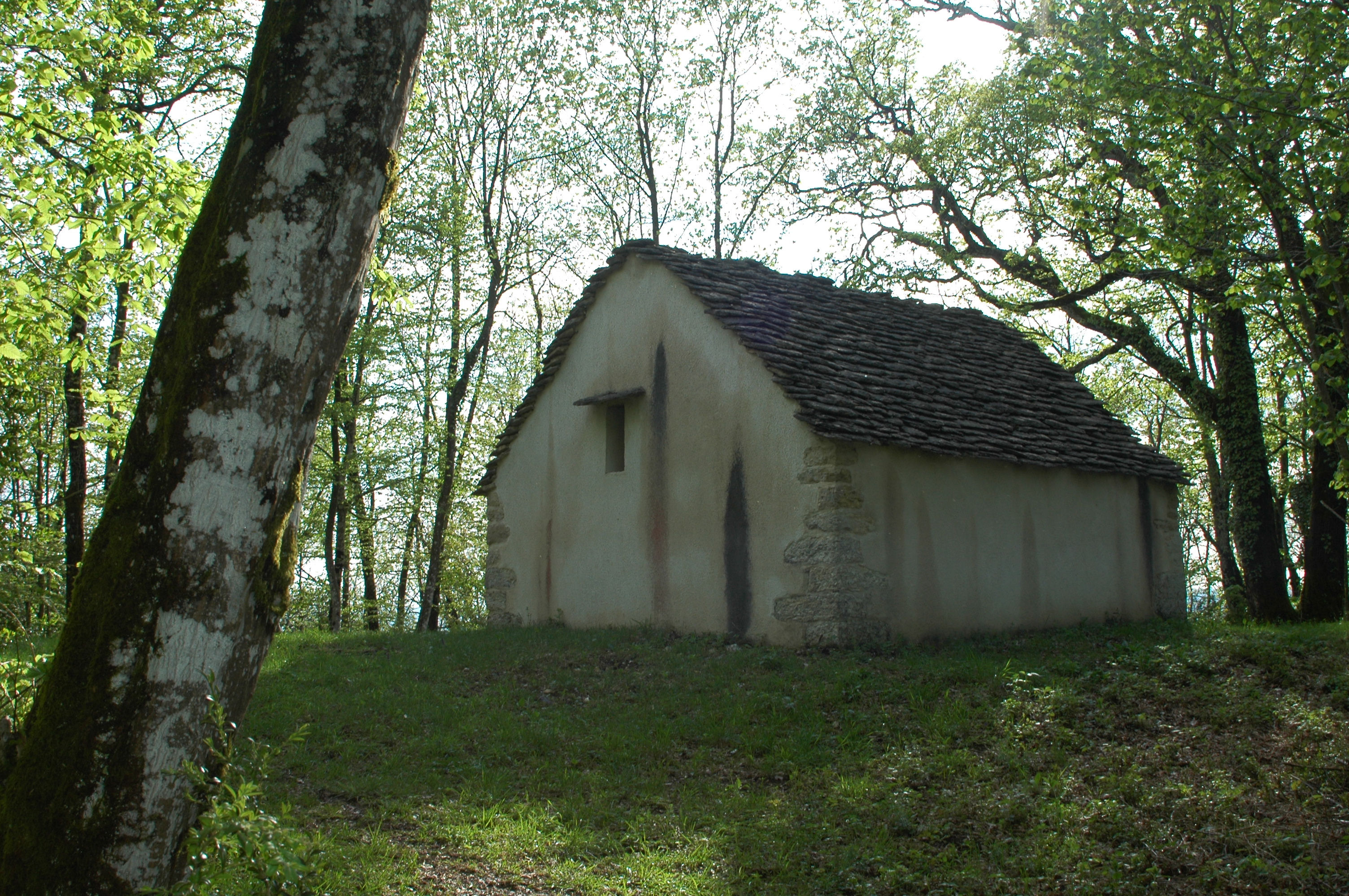 Chapelle Saint-Maurice à Legna